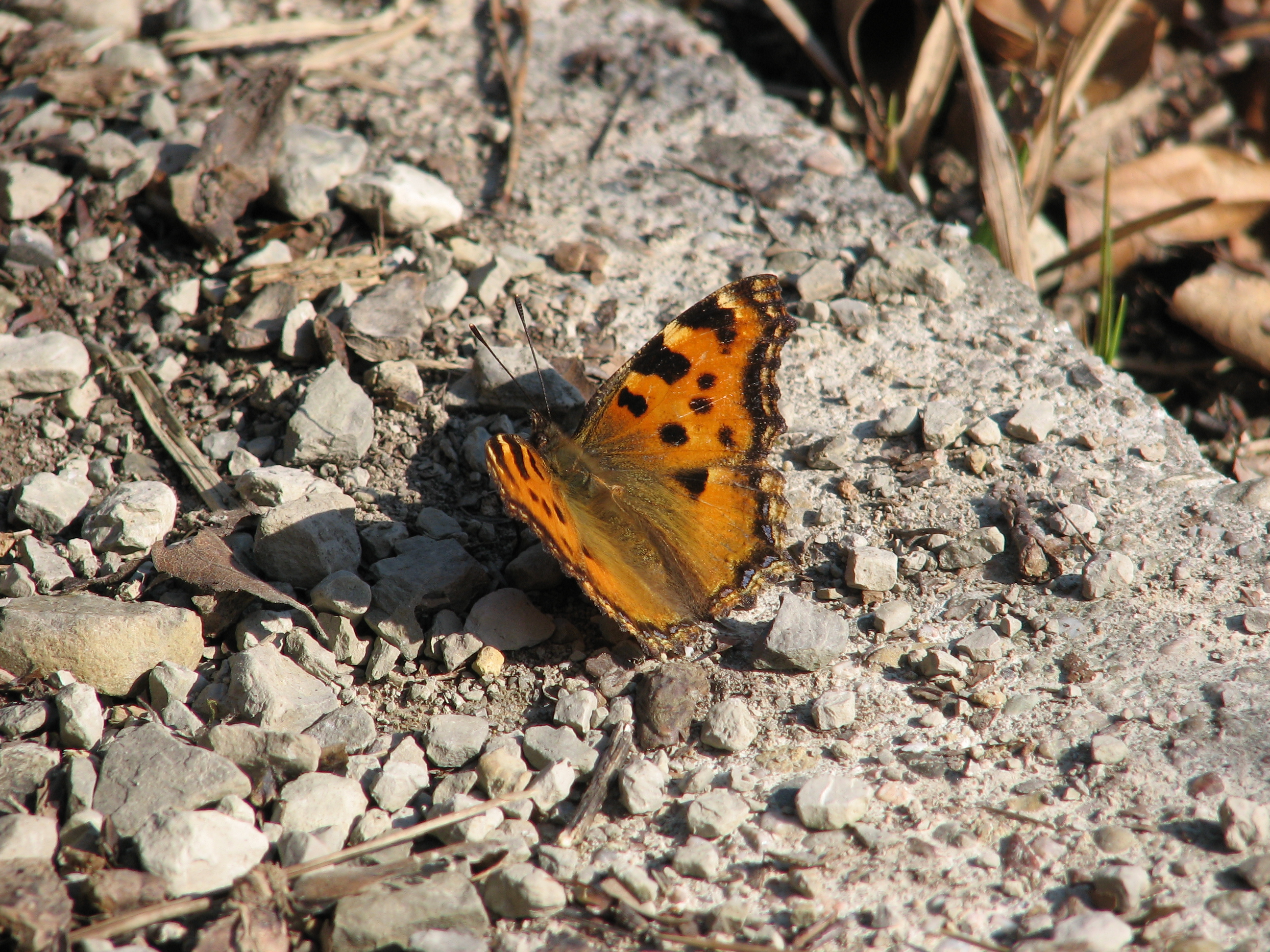 Großer Fuchs am Neckar